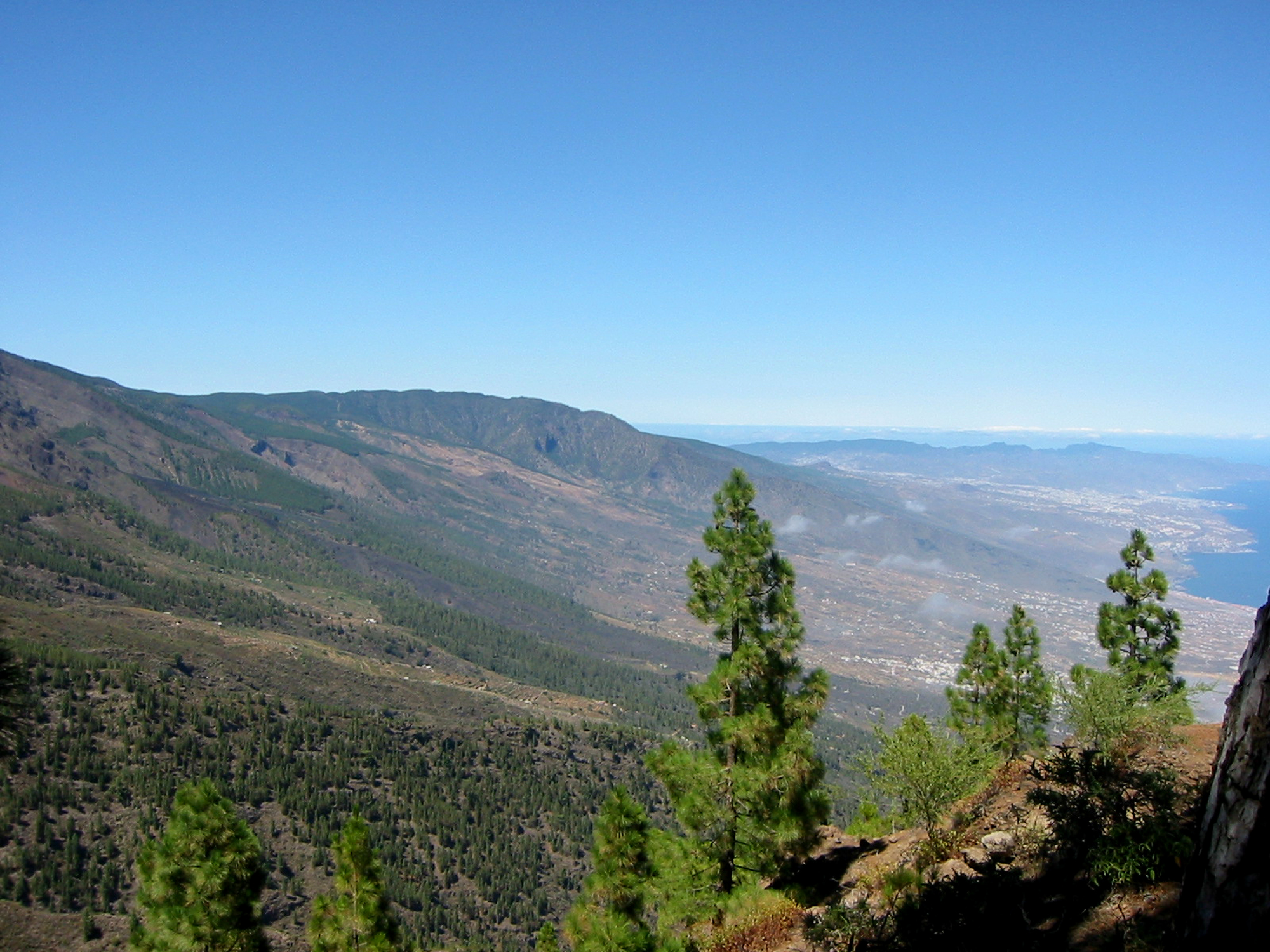 En primer plano, pinares de La Ladera de Güímar. En el centro de la foto, montes de Güímar y lenguas de lava del volcán de Las Arenas (1705). Al fondo, Ladera de Chafa. Más al fondo, Santa Cruz de Tenerife y tras suyo, los montes de laurisilva de Anaga. Árboles: Pinus canariensis. Tenerife, Canarias, España.